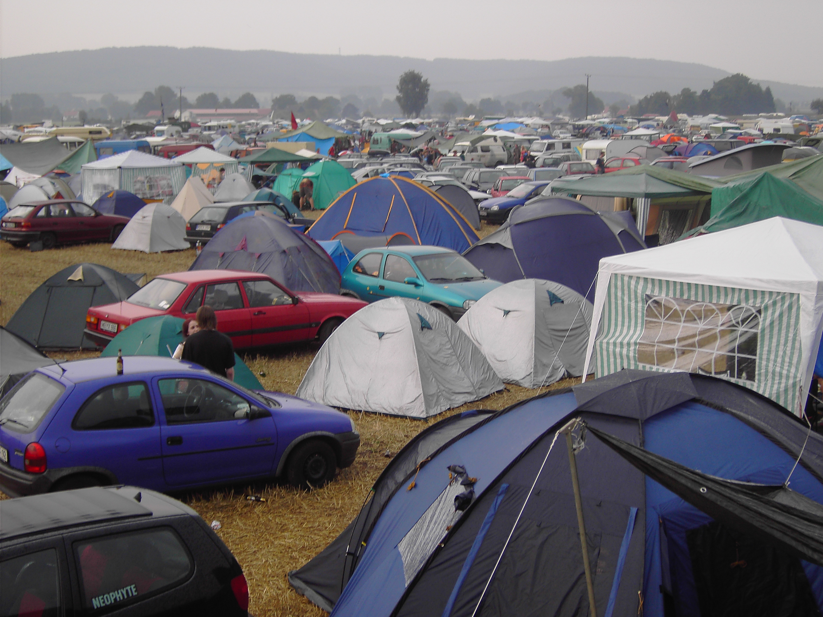 Der Zeltplatz des Stemweder Open Air - Festivals